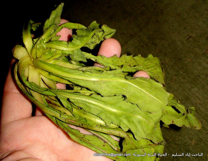 نباتات برية سورية تؤكل